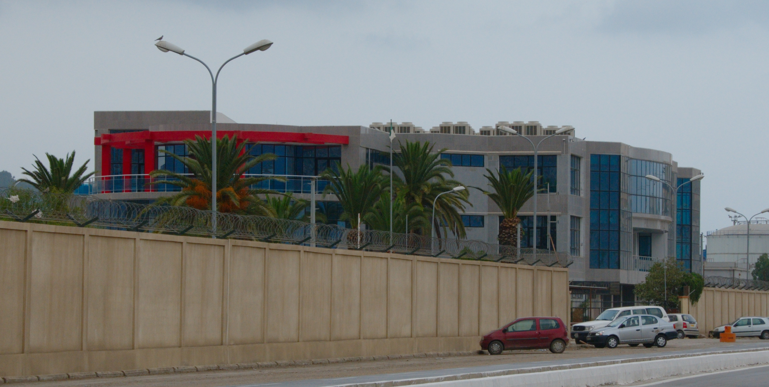 Nouveau batiment de la société sonatrach à Béjaïa